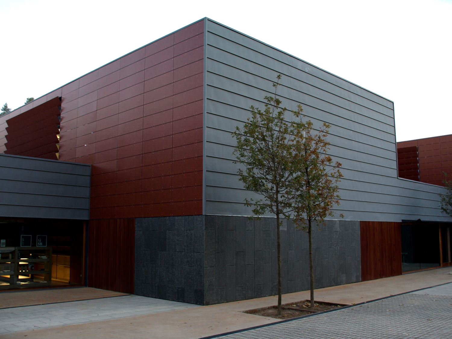 Edifici anomenat "Fabrica" a Món Sant Benet, adjacent al Monestir de Sant Benet de Bages (Bages, Catalunya, Espanya)